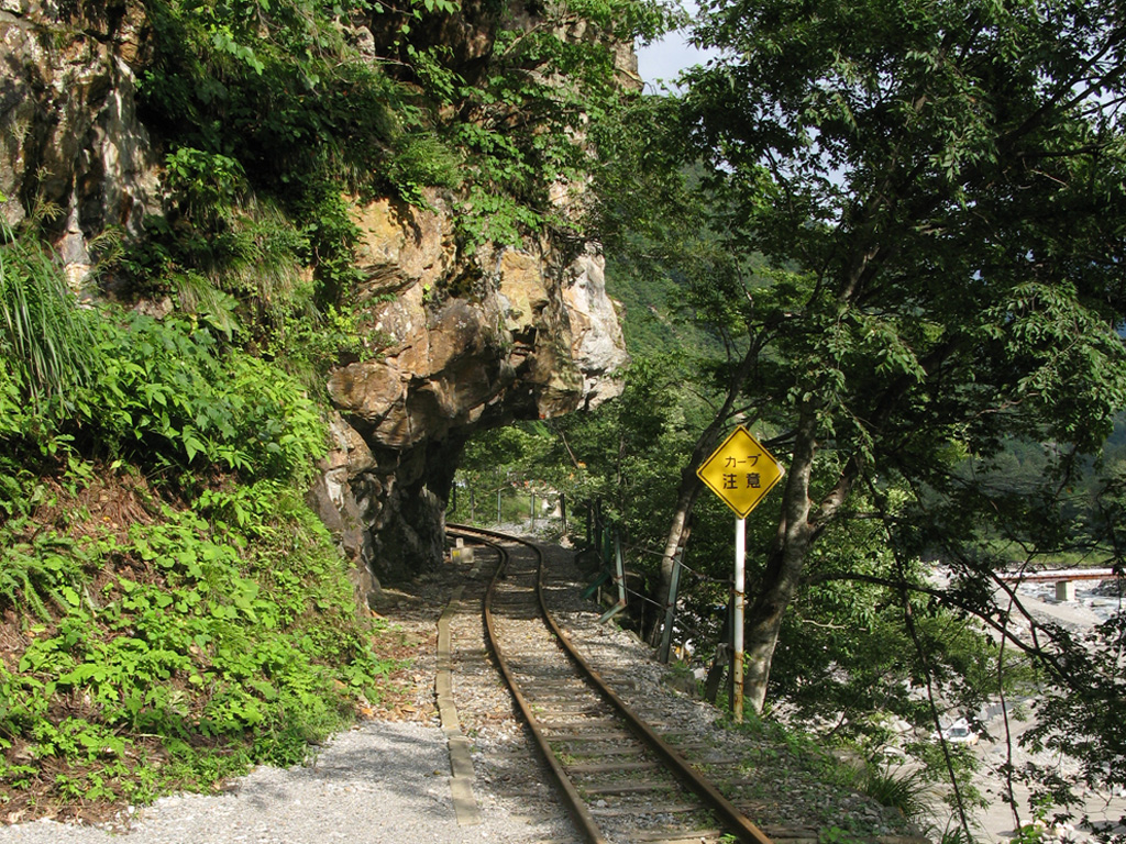 立山砂防軌道の通称「桑谷のオーバーハング」。路線改良に伴い使用されなくなったが、付近に見学用の臨時停車場が設けられ、見学用列車が停車する（2007年9月現在）。2007年9月12日、投稿者が撮影。 Tateyama Sabō Erosion Control Works Service Train